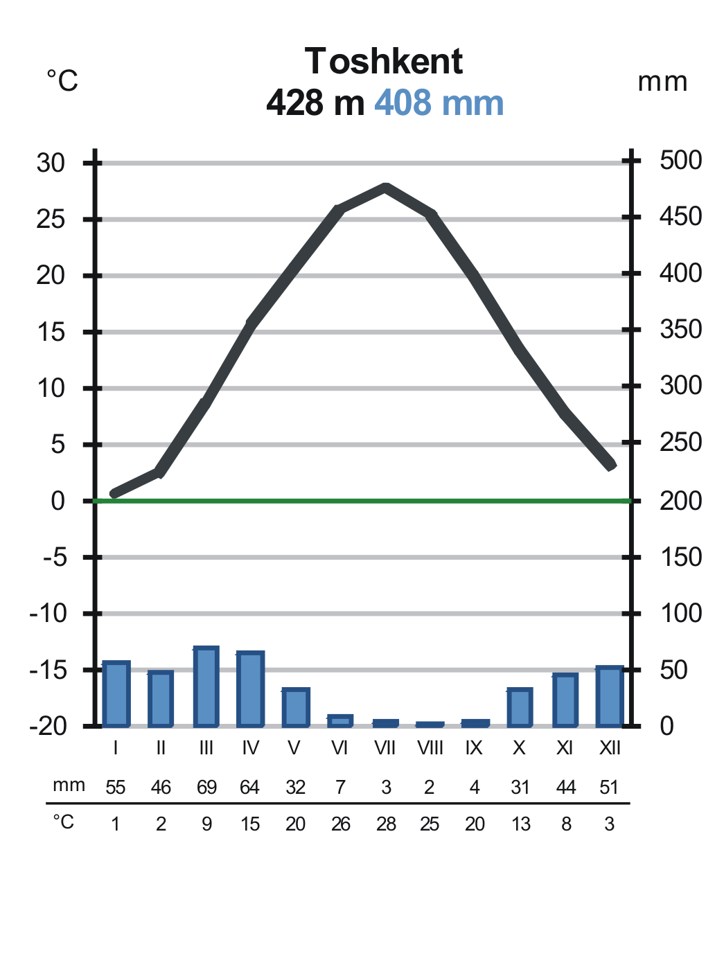 Toshkenti kliimadiagraam Usbekistan